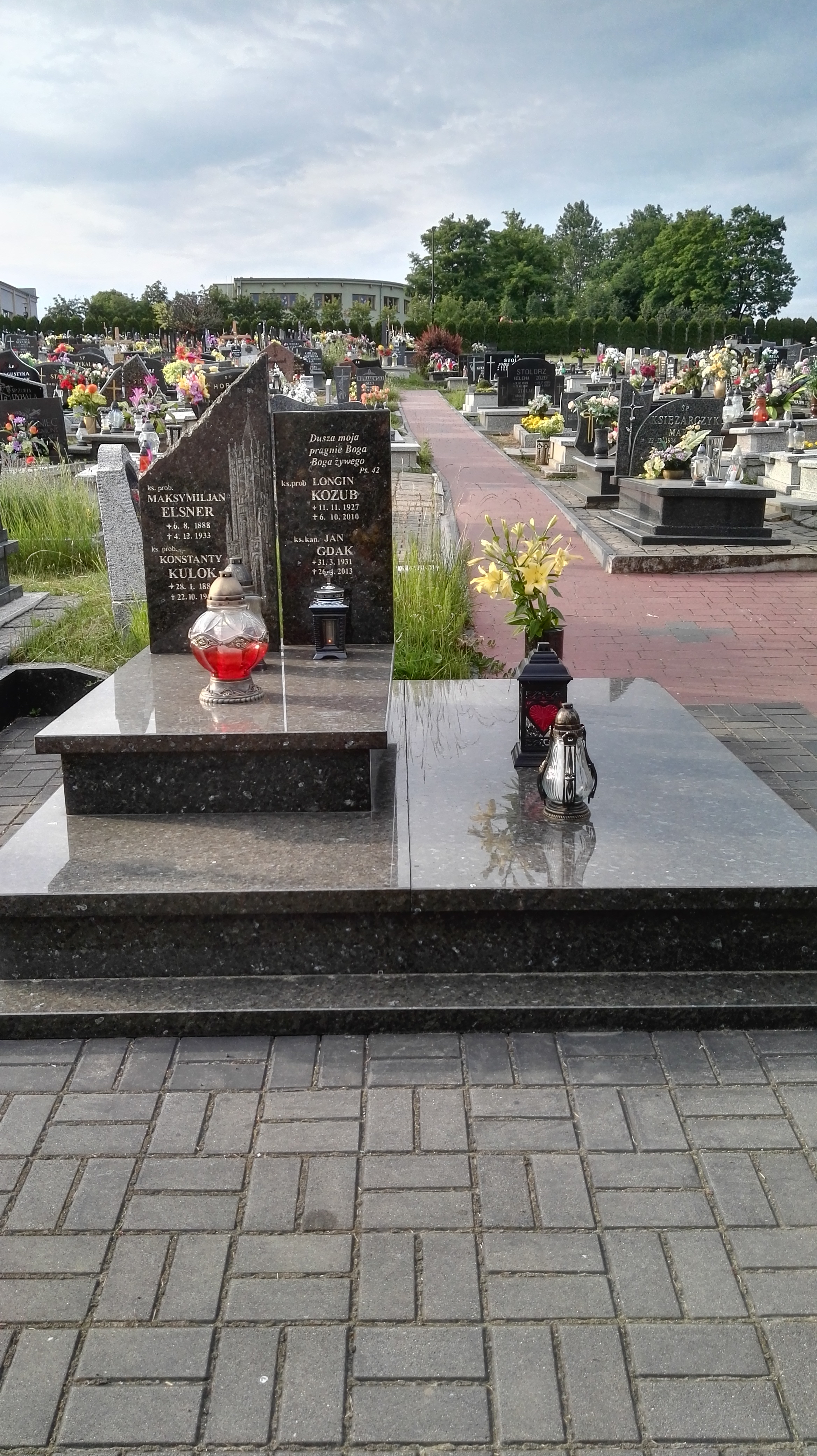 Grobowiec proboszczów imielina